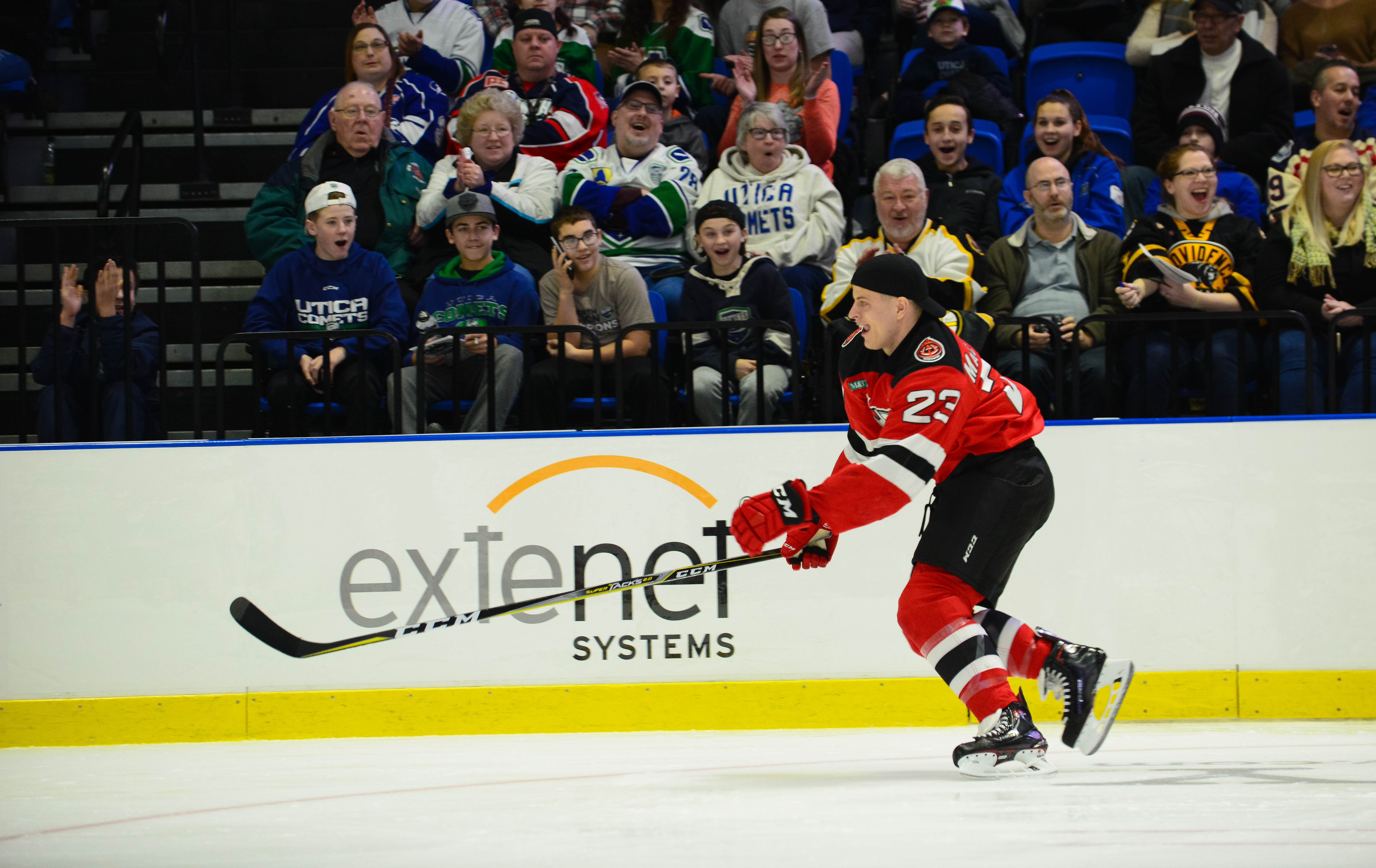 (Bryan Peck/ AHL)